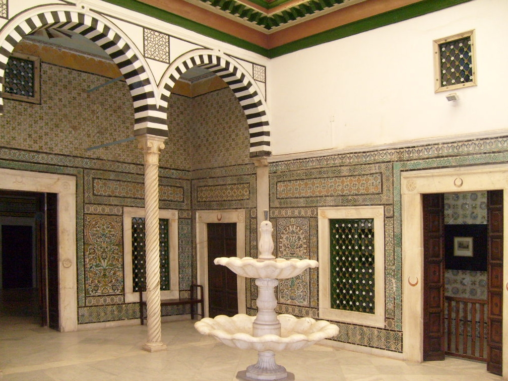 Cour intérieure du Musée national du Bardo (Tunisie) à l'architecture traditionnelle